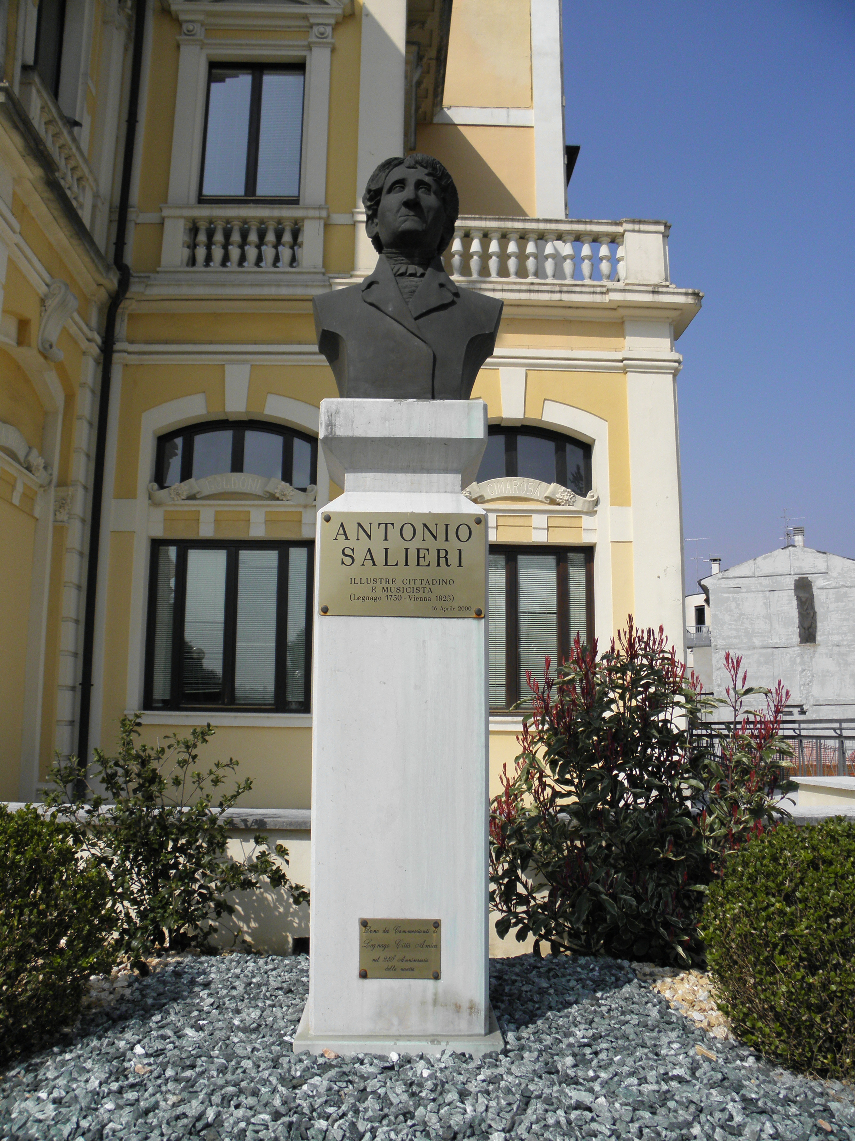 Legnago, il monumento dedicato ad Antonio Salieri sito nei pressi del teatro Salieri.